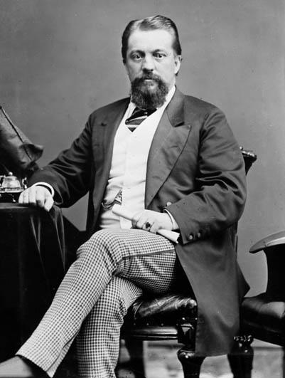 Le premier ministre du Québec John Jones Ross en mars 1873 à Ottawa; Quebec's premier John Jones Ross, march 1873, Ottawa